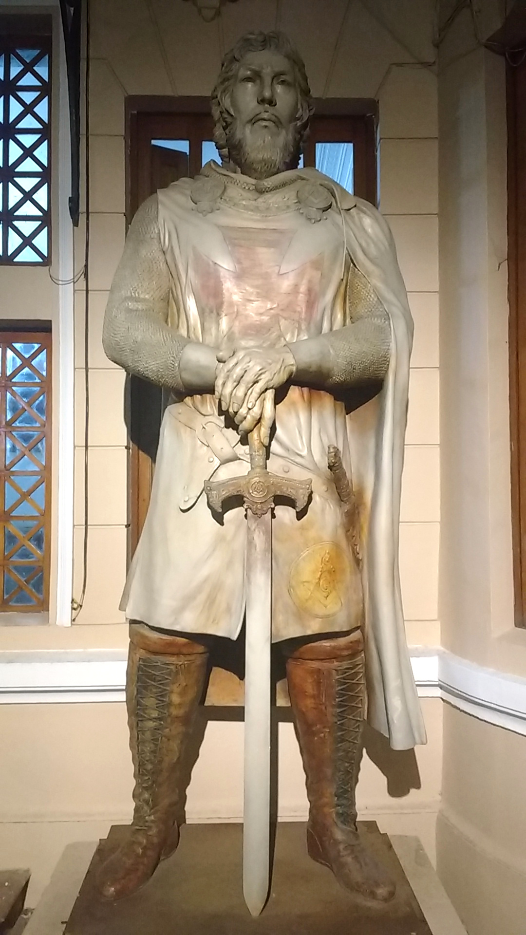 Una de las esculturas de un par de caballeros templarios que adornan la entrada de la Gran Logia de Colombia con sede en Bogotá.